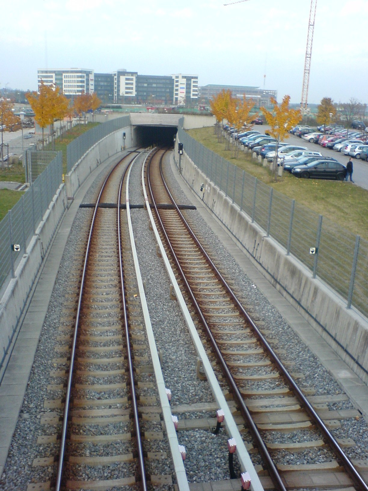 Schienennetz der U-Bahn München: Blick auf den Tunnel in Richtung Haltepunkt Garching, Blick vom U-Bahnhof Garching-Hochbrück (Oberbayern)